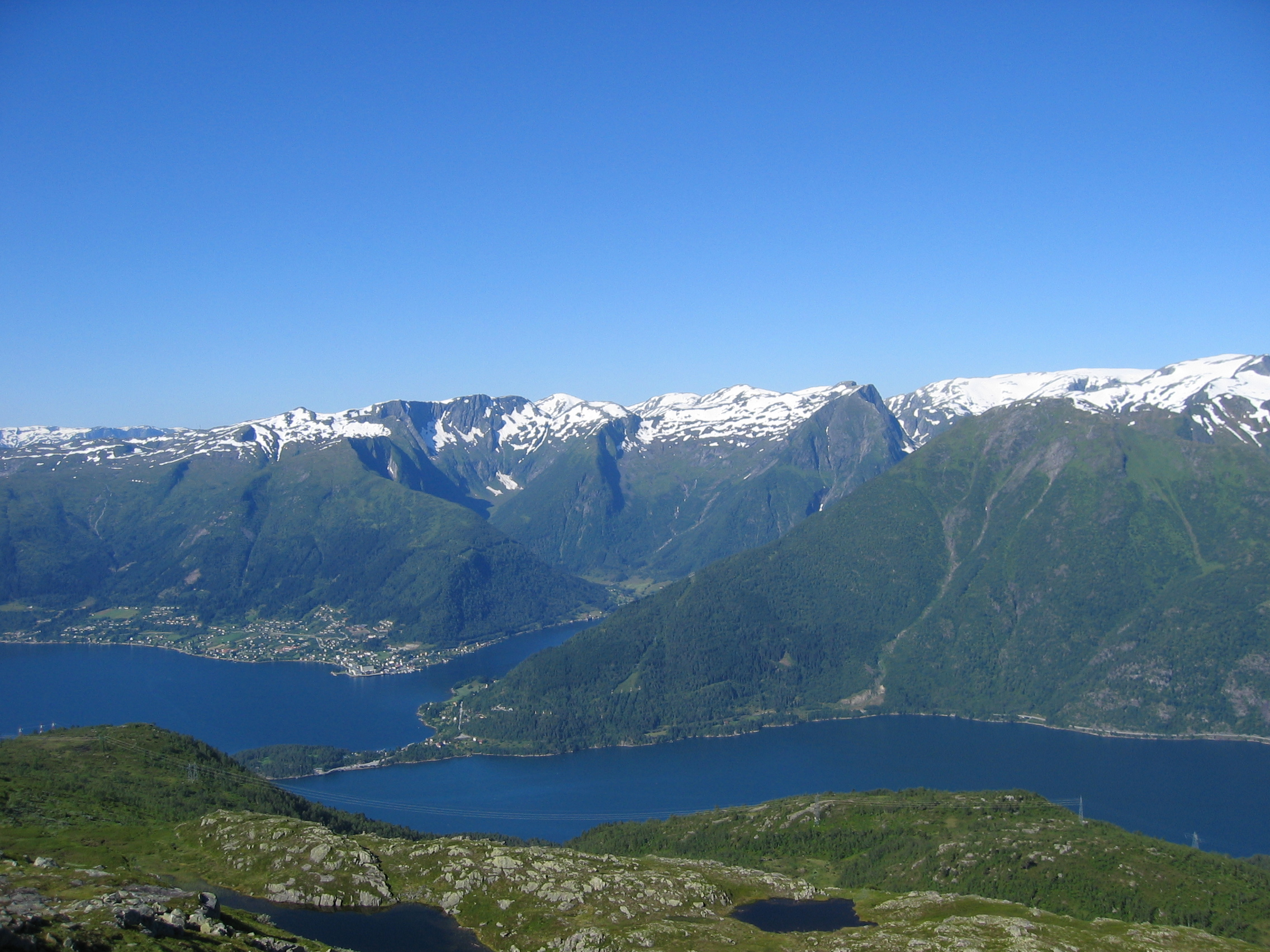 Fjorden til høgre i biletet er ytre delen av Fjærlandsfjorden. Neset som går mellom han og Sognefjorden er Vengeneset. Der ser ein ferjestaden Dragsvik. Bak det går Esefjorden innover. På hi sida av Esefjorden ligg kommunesenteret i Balestrand, Holmen, der det store bygget ein kan skimte nede med fjorden er Kviknes hotell. Vegen som går frå Dragsvik og mot høgre er Riksveg 13, medan Riksveg 55 går frå Dragsvik og langs Esefjorden og gjennom Holmen og fortset utover langsmed Sognefjorden.